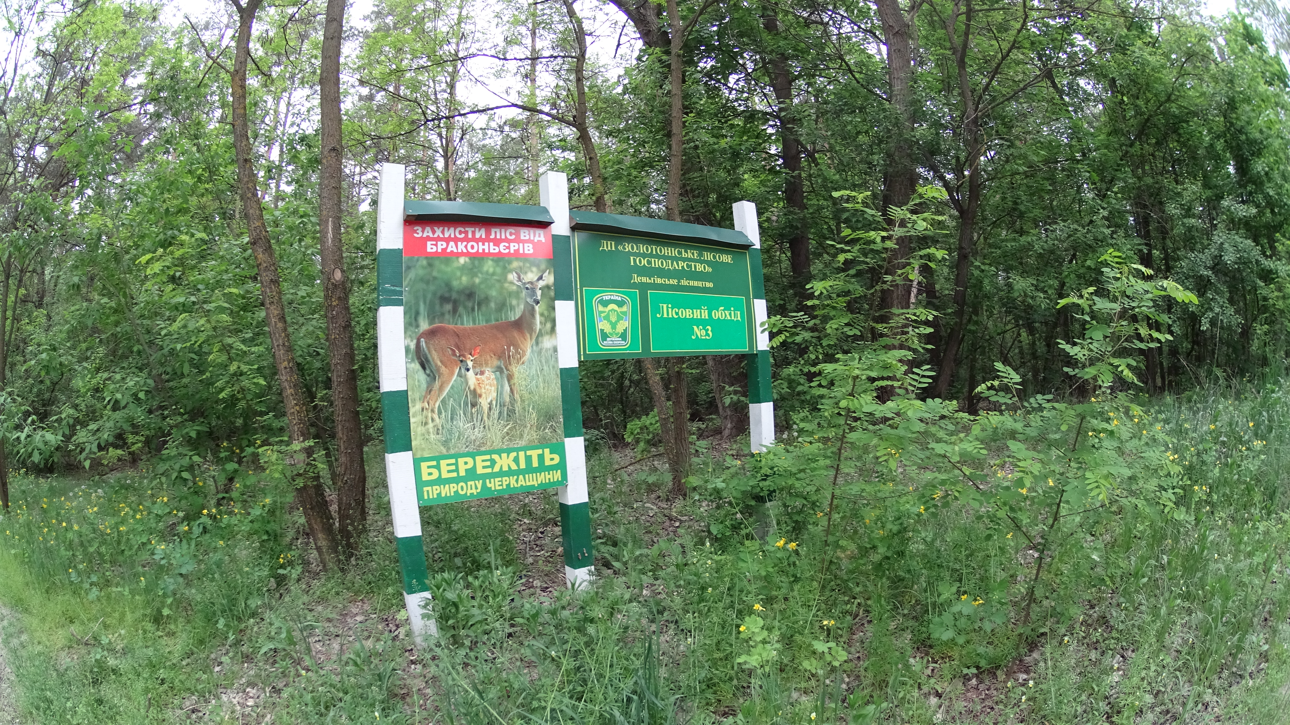 Деньгівське лісництво, Лісовий обхід 3